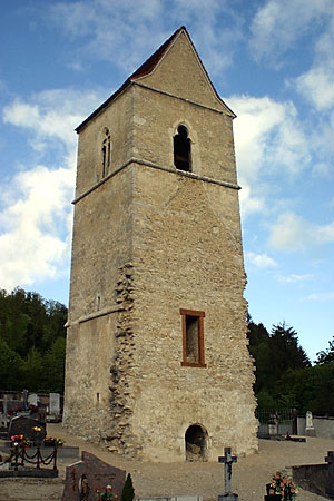 Die Tour de Mormont, ein Glockenturm bei Courchavon